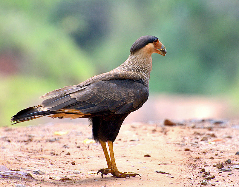 Estrada velha Piraju / Sarutaiá, próximo à Bica de Pedra, São Paulo, Brasil.